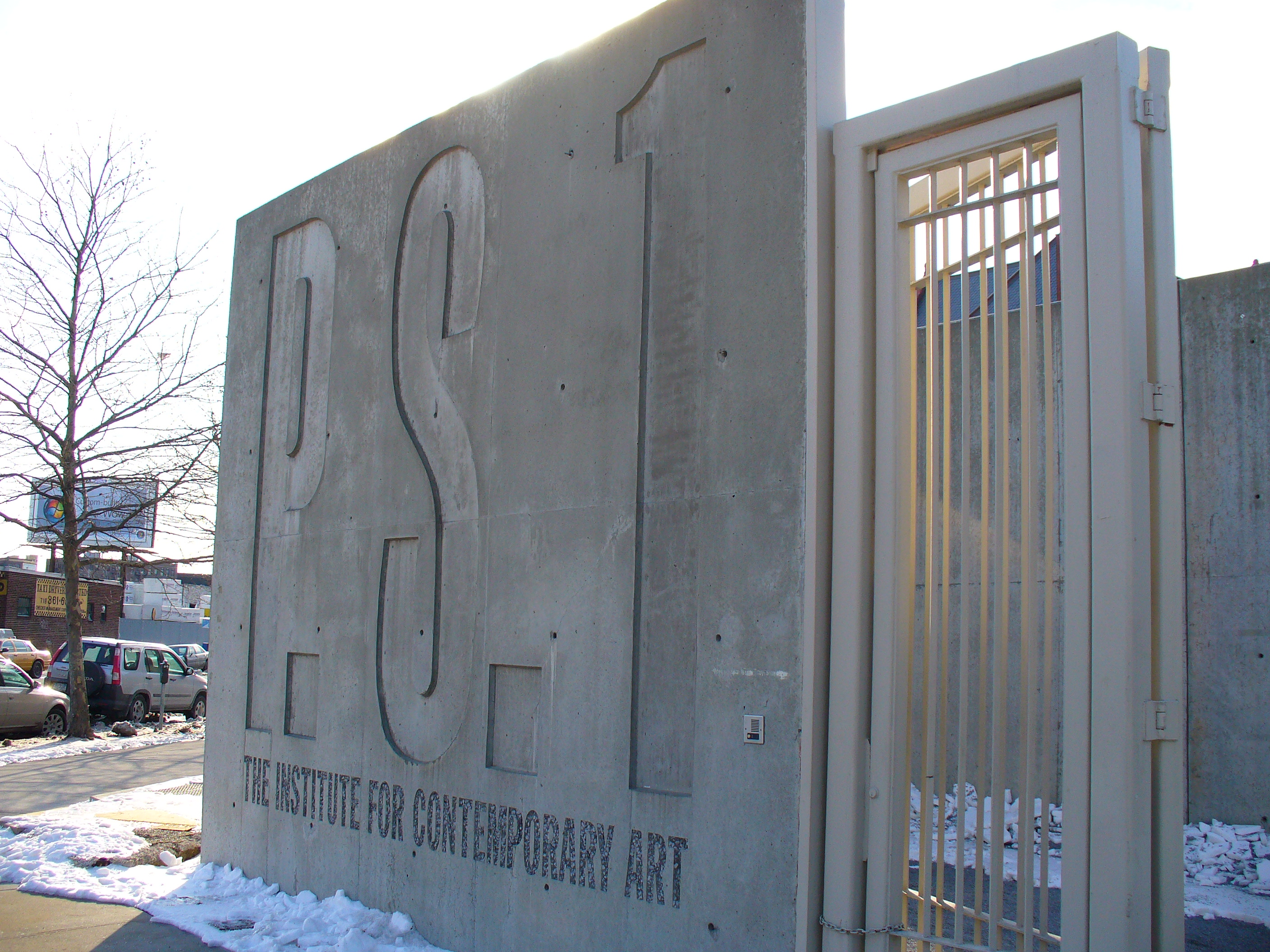 PS 1 sign by David Shankbone